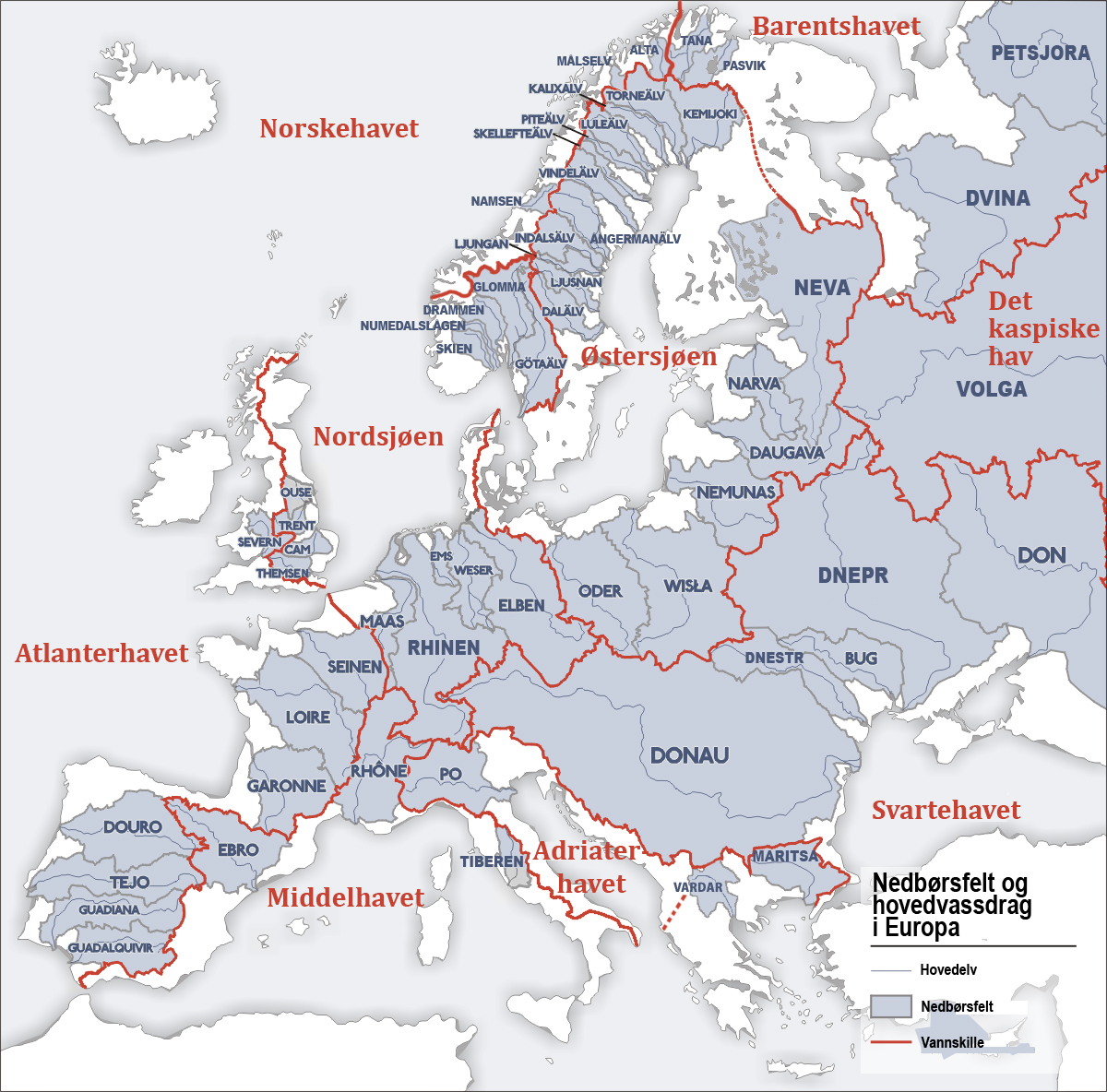 Grafik zeigt die Europäischen Flußeinzugsgebiete und Hauptwasserscheiden. Zeichnung erstellt 06/2004 von Sansculotte. Bild ist unter der Creative Commons Share Alike zur weiteren Verwendung freigegeben. Quellenangabe und Beleg an erbeten.